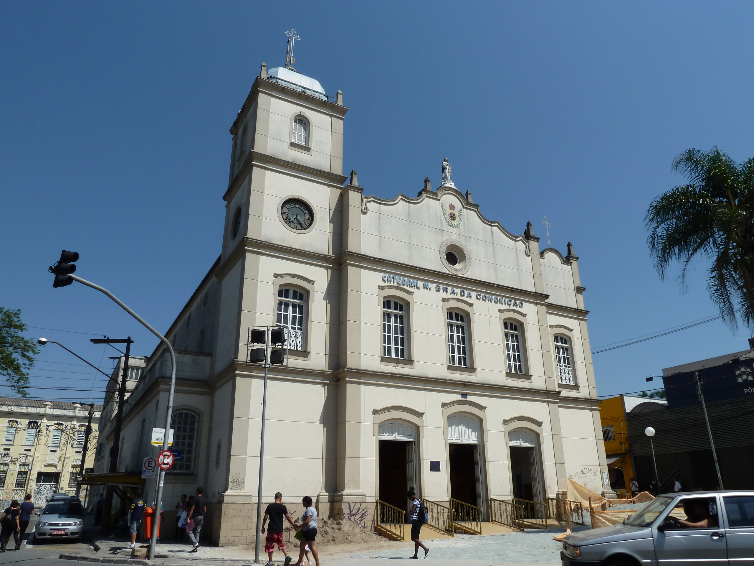 Guarulhos, Igreja Matriz